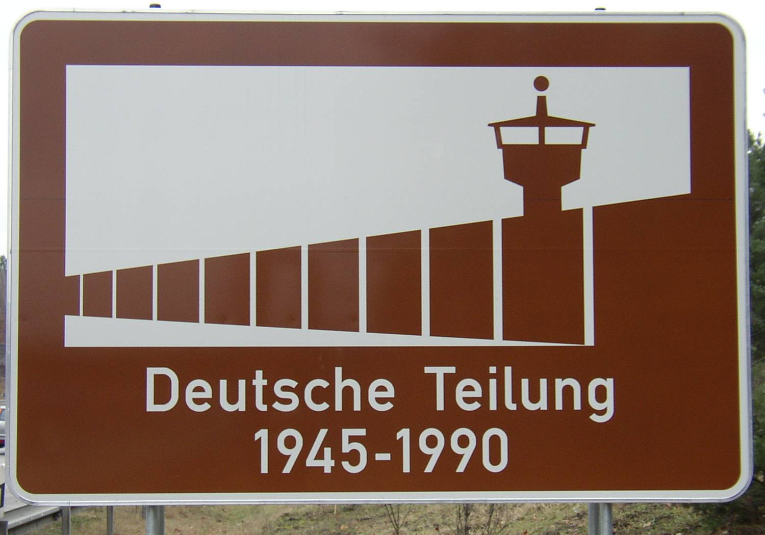 Unterrichtungstafel „Deutsche Teilung 1945-1990“ an der A 115 südwestl. von Berlin (in Südrichtung), Deutschland